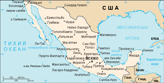 Мапа Мексики.